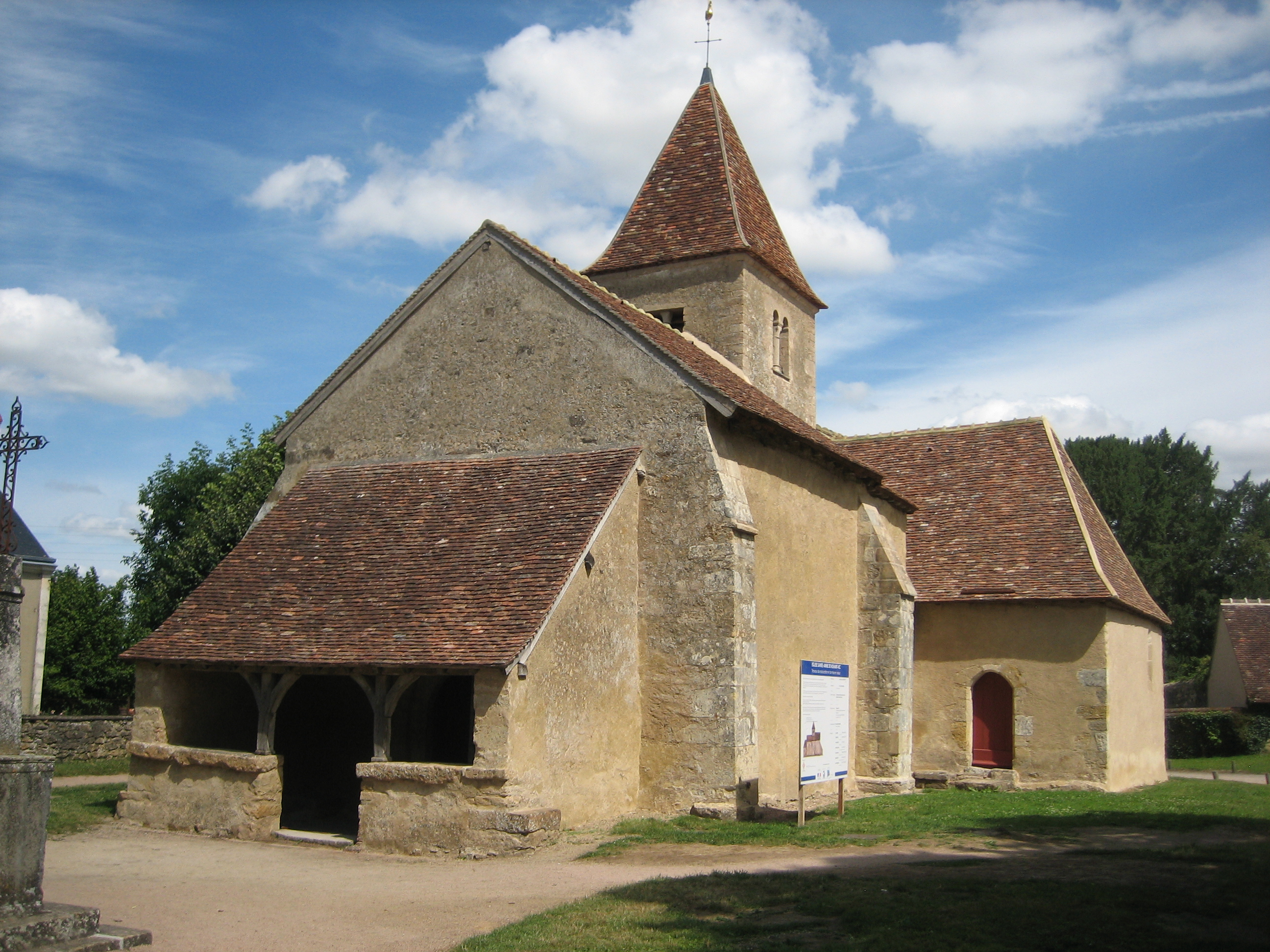 chapelle sainte Anne à Nohant restaurée